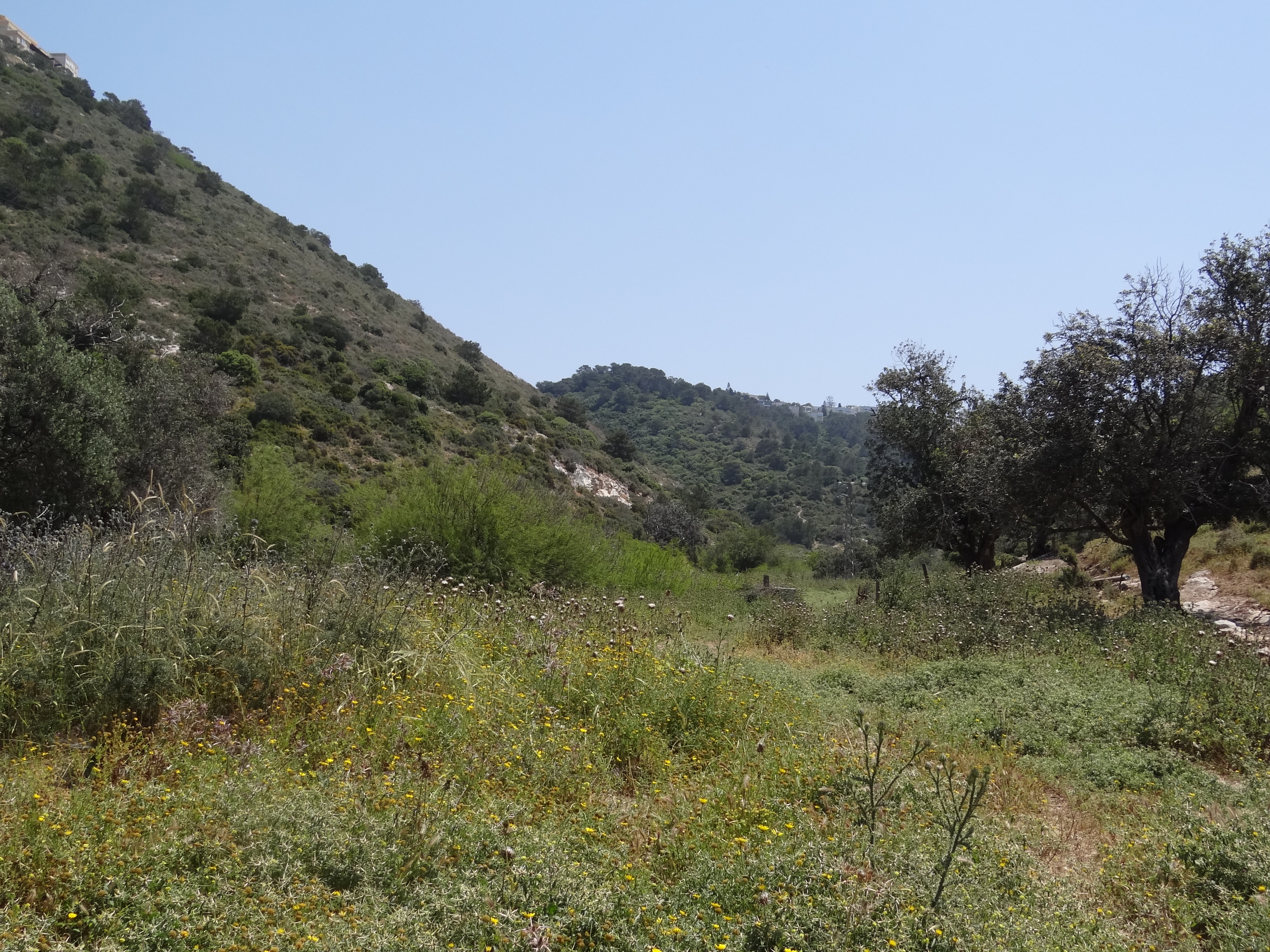 Wadi Ezov, Haifa, Israel. נחל אזוב בכרמל